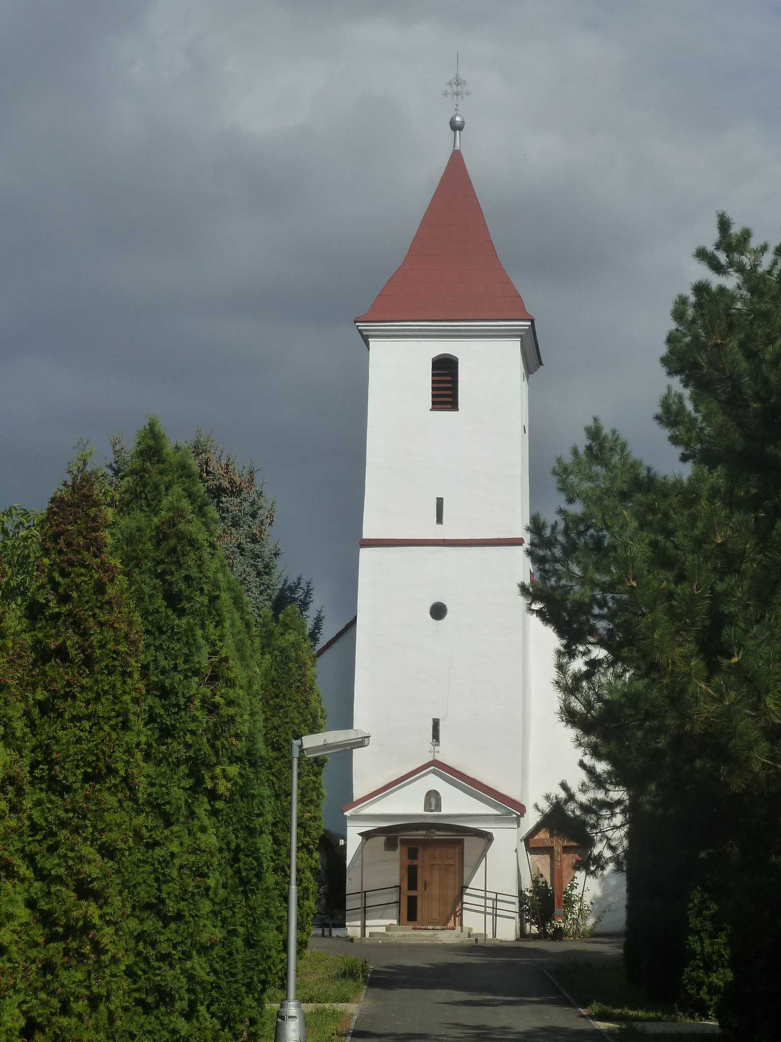 Kostol sv. Kataríny v Čeľadiciach